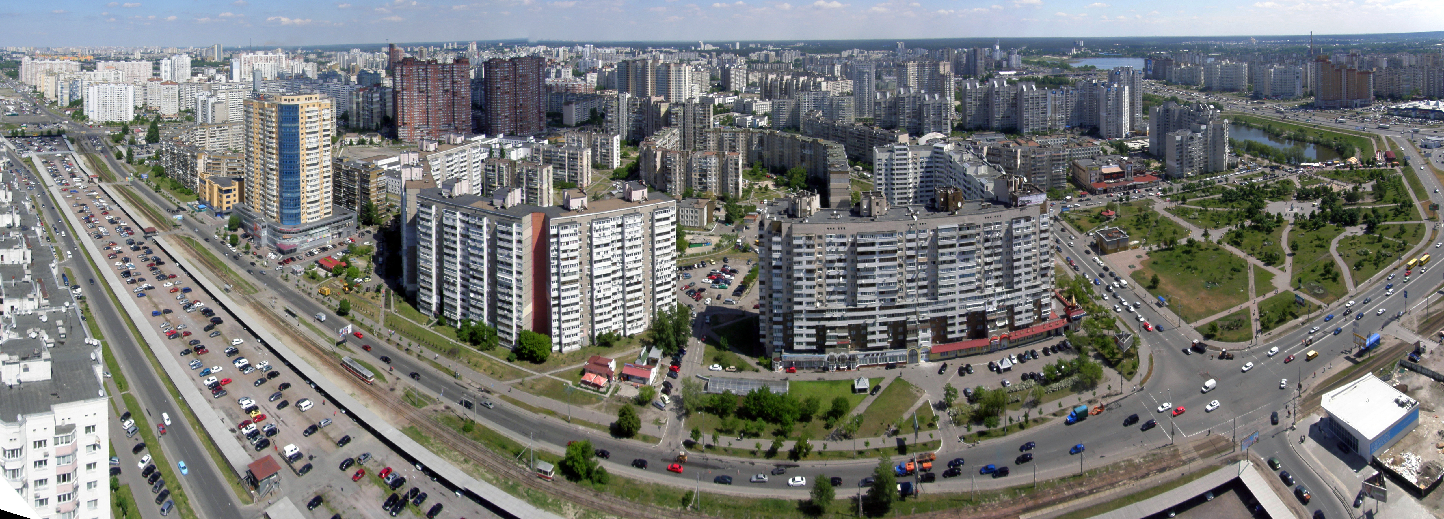 7 и 6а микрорайоны Позняков